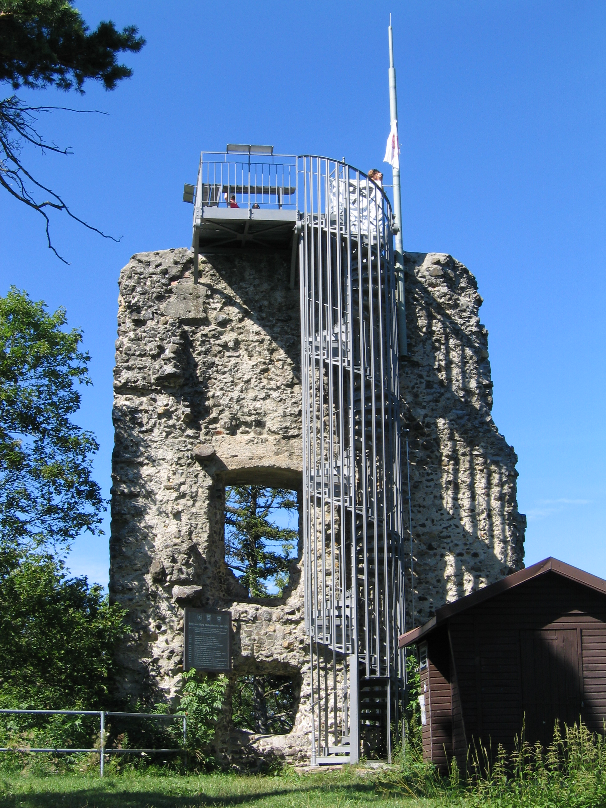 Aussichtsplatform an der Burgruine Hohenhewen im Hegau.